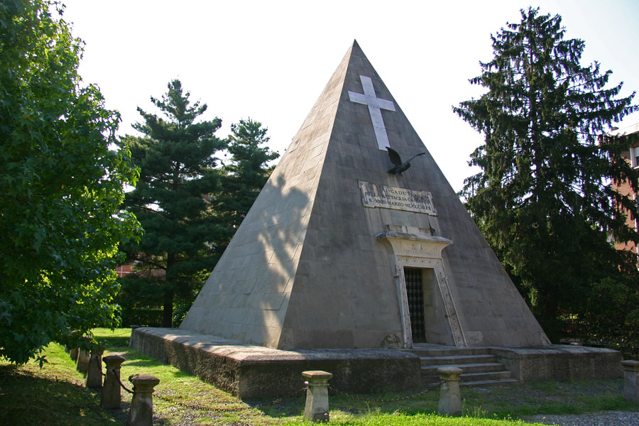 La piramide-ossario nel quartiere Bicocca a Novara, costruita in ricordo della Battaglia del 23 marzo 1849, su progetto di Luigi Broggi